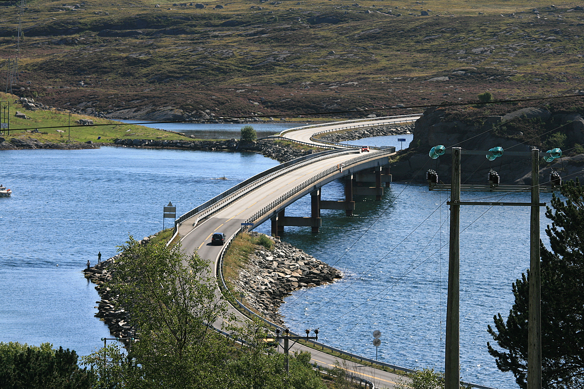 Frekasundbrua